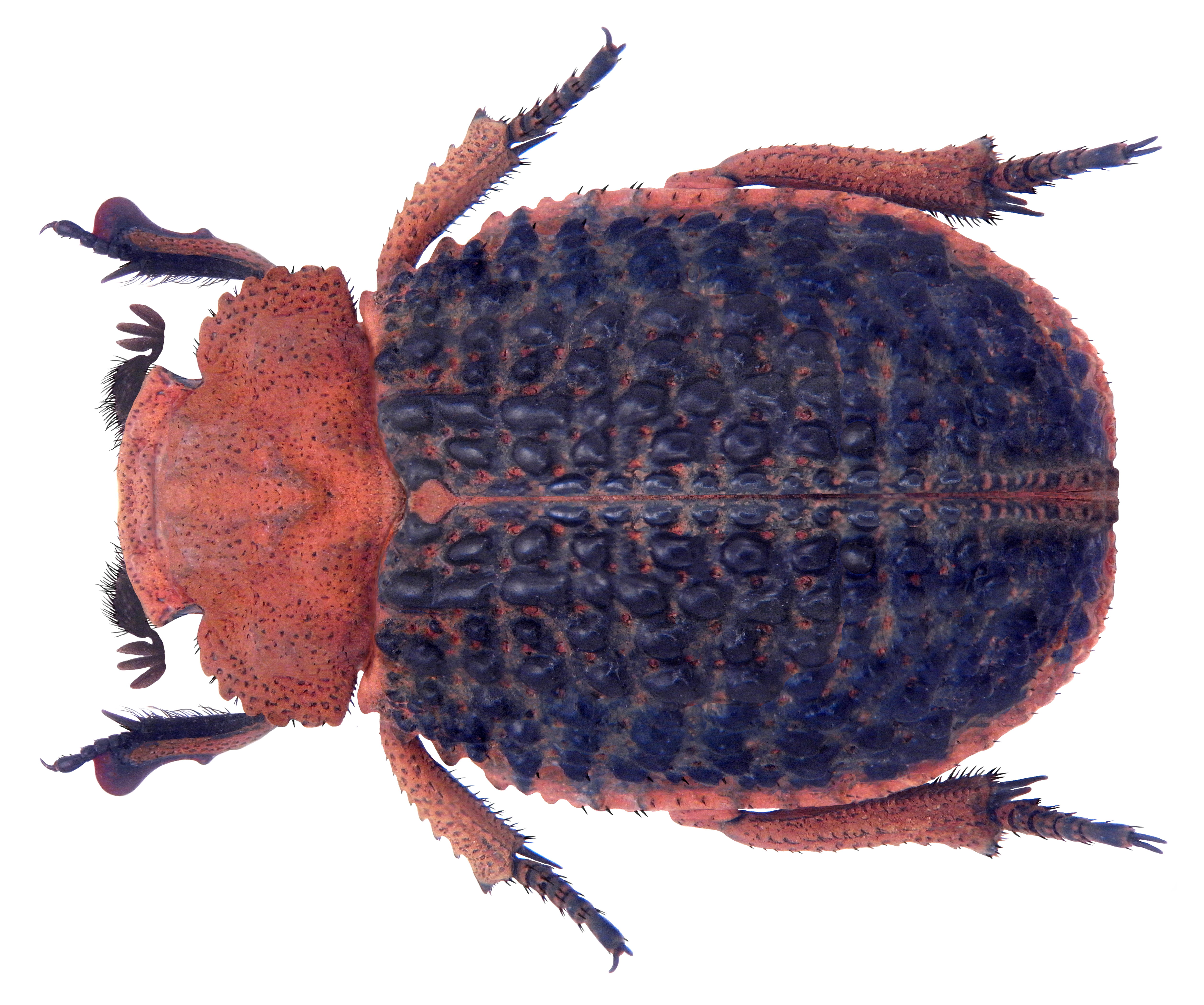 Familie: Trogidae Groesse: 15,5 mm Fundort: Kenia, Tsavo National Park, Voi leg. U.Schmidt, 1991; det. H.Kalz, 2009 Photo: U.Schmidt, 2010